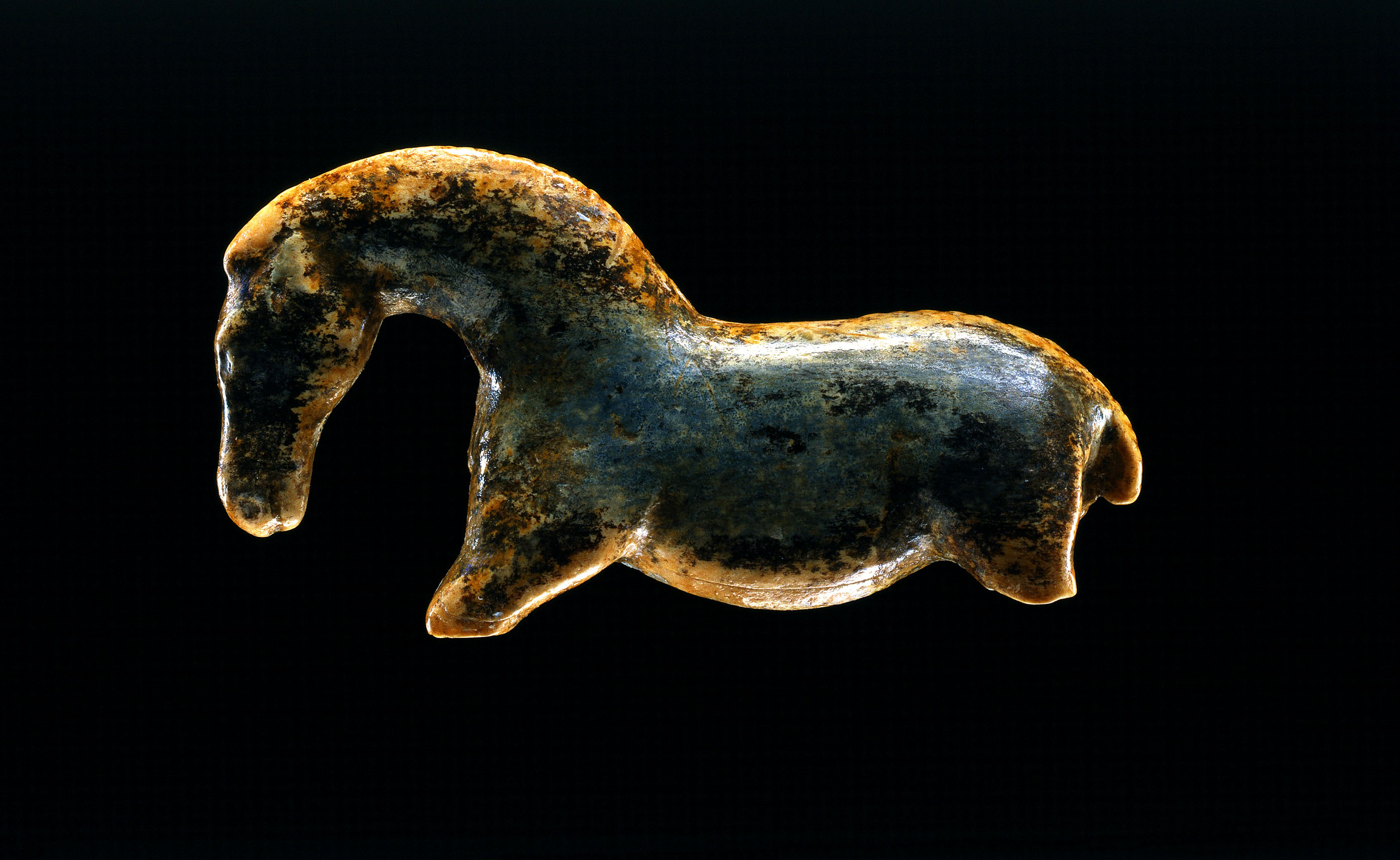 Wildpferd